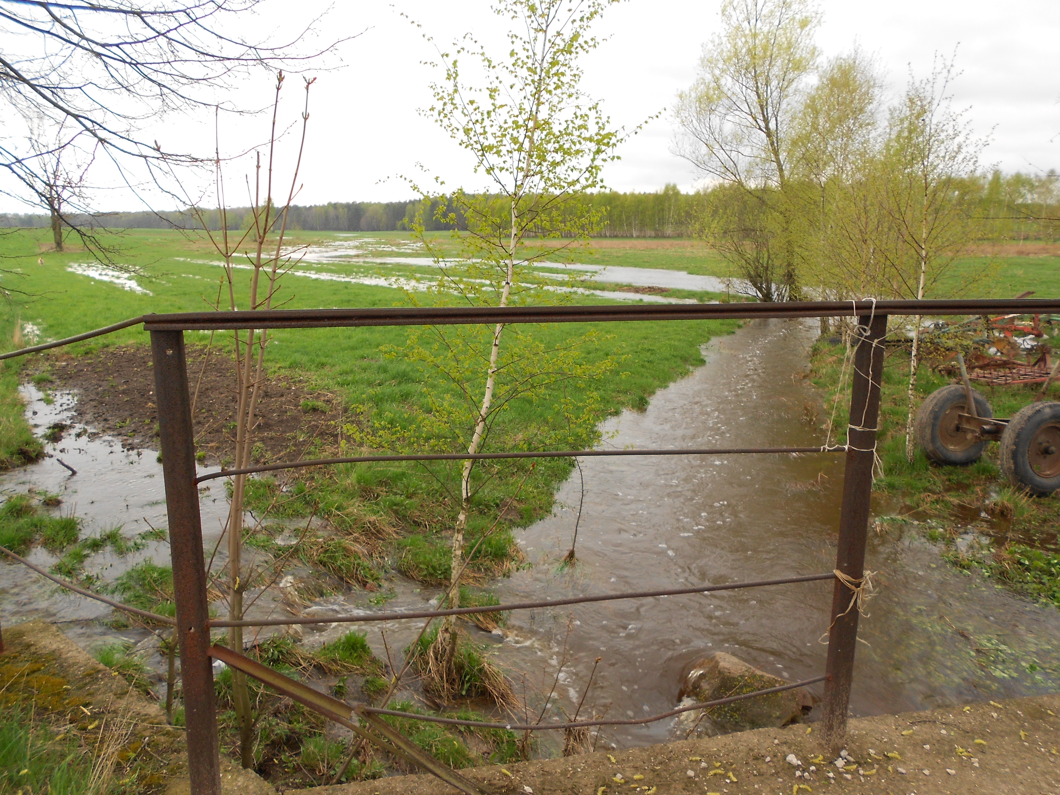 Świdno zalane podczas wiosennych opadów